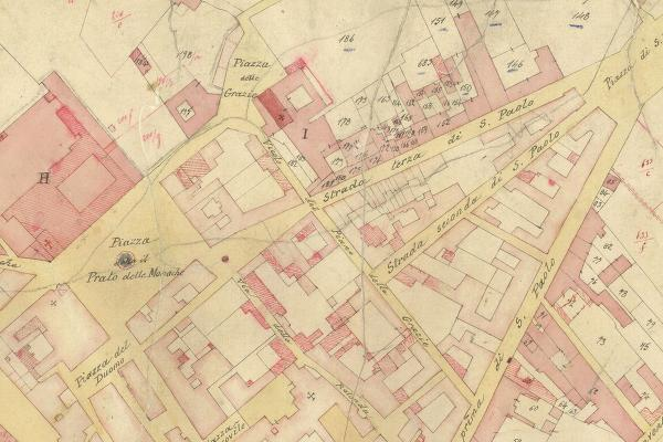 Albano 1 Catasto Rustico 1870